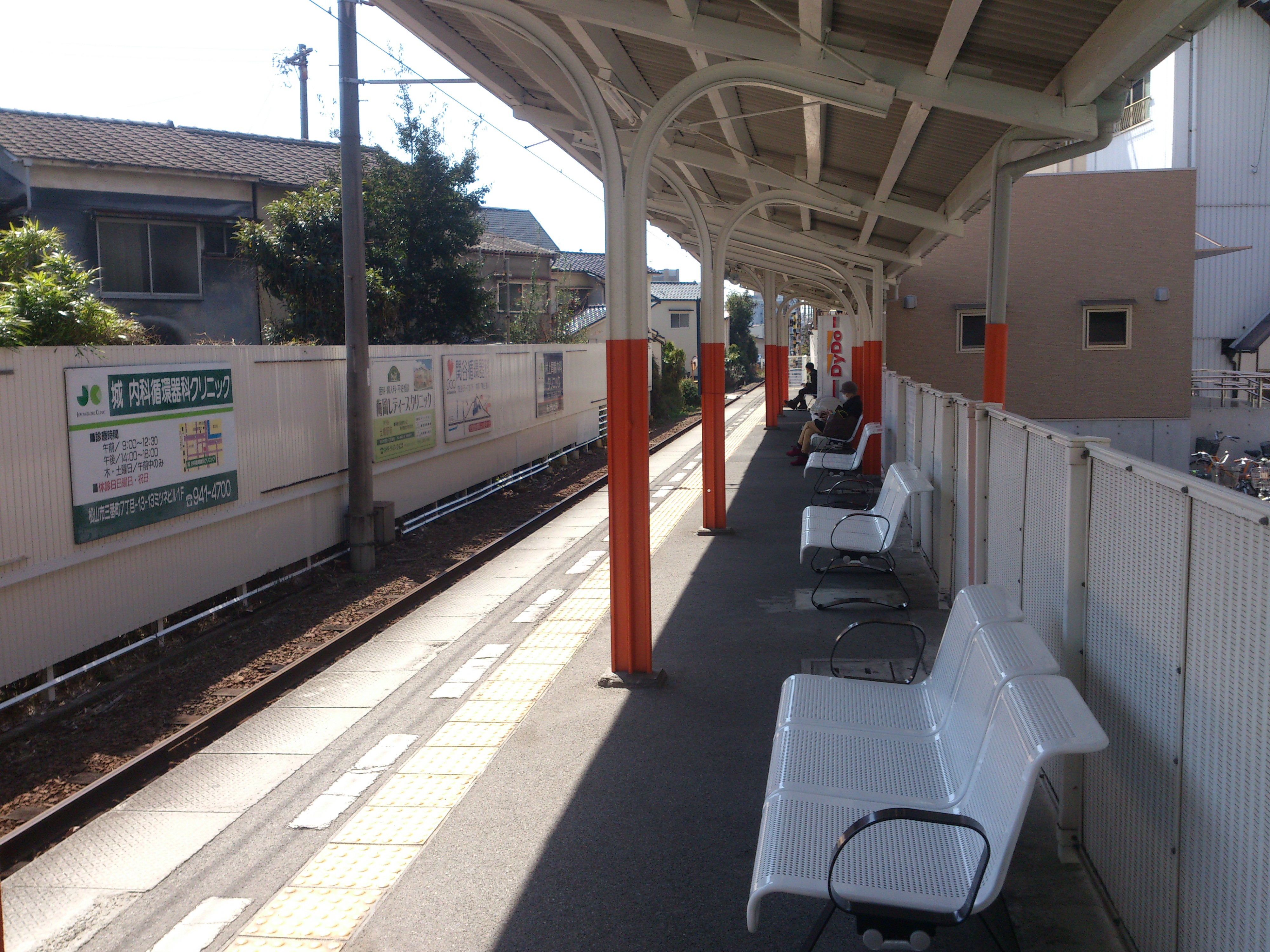 伊予鉄道 土橋駅のホームです。